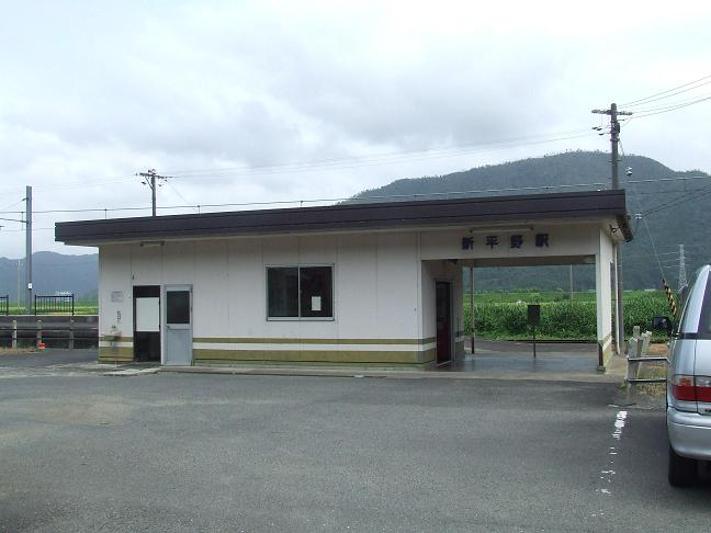 JR新平野駅の駅舎